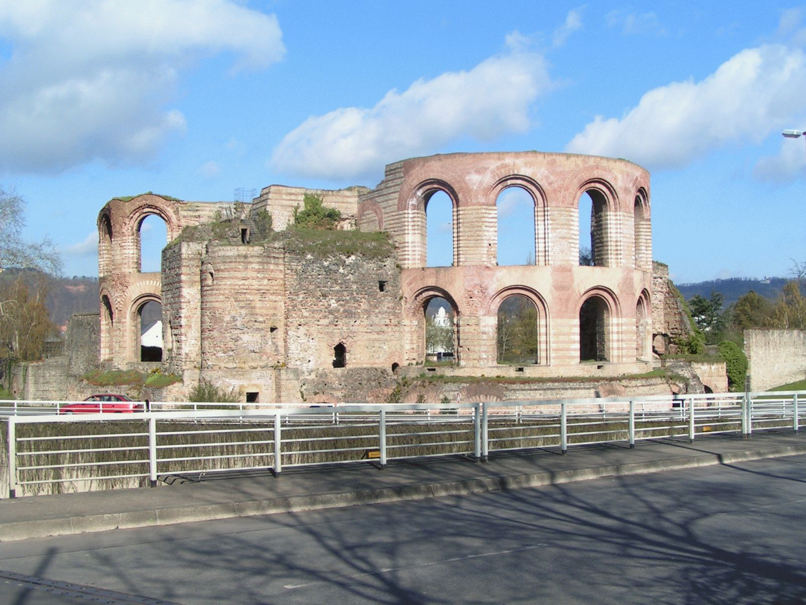 Trier Kaiserthermen Quelle: selbst erstellt Fotograf: Stefan Kühn